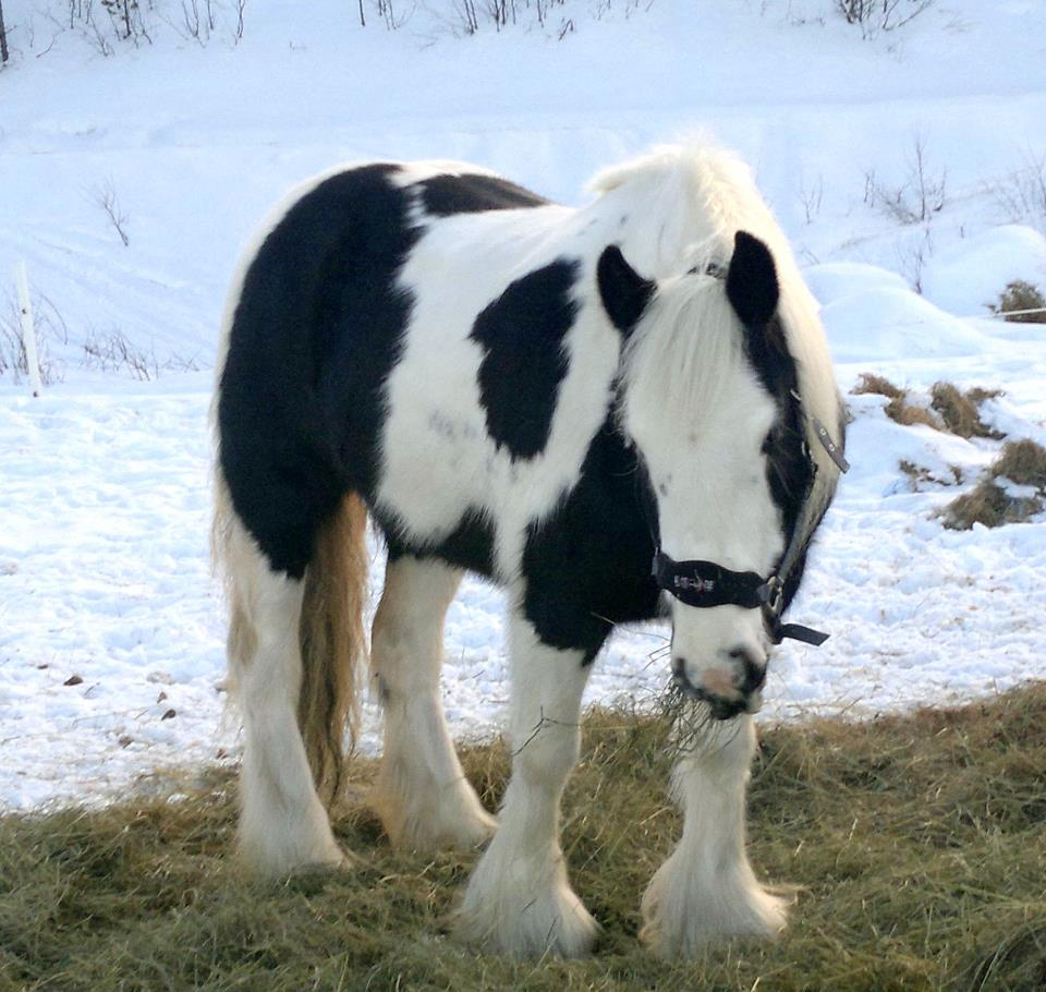 Tinkerhest, Gypsy, cob